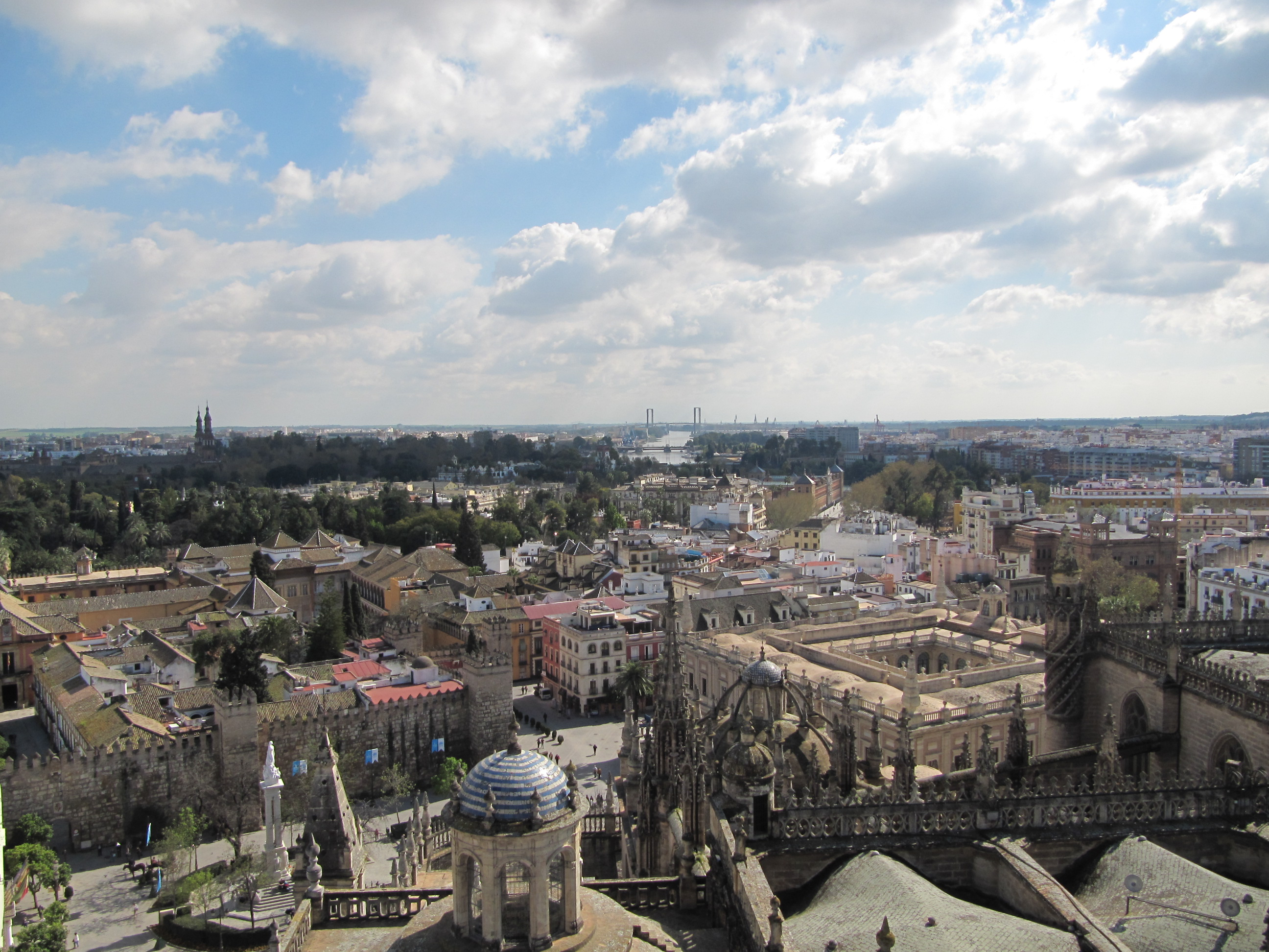 Sevilla - March 2011 - 059.jpg